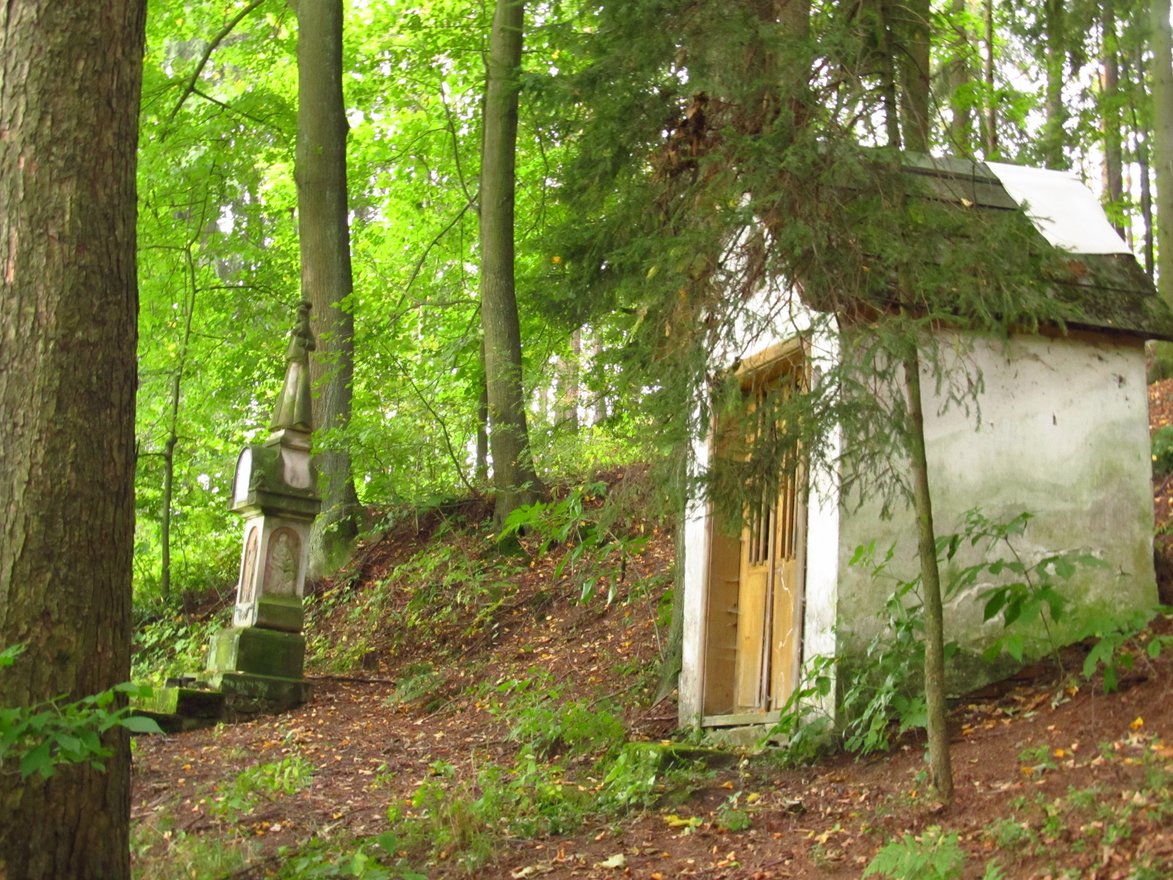 Socha Panny Marie, Lesnovek.